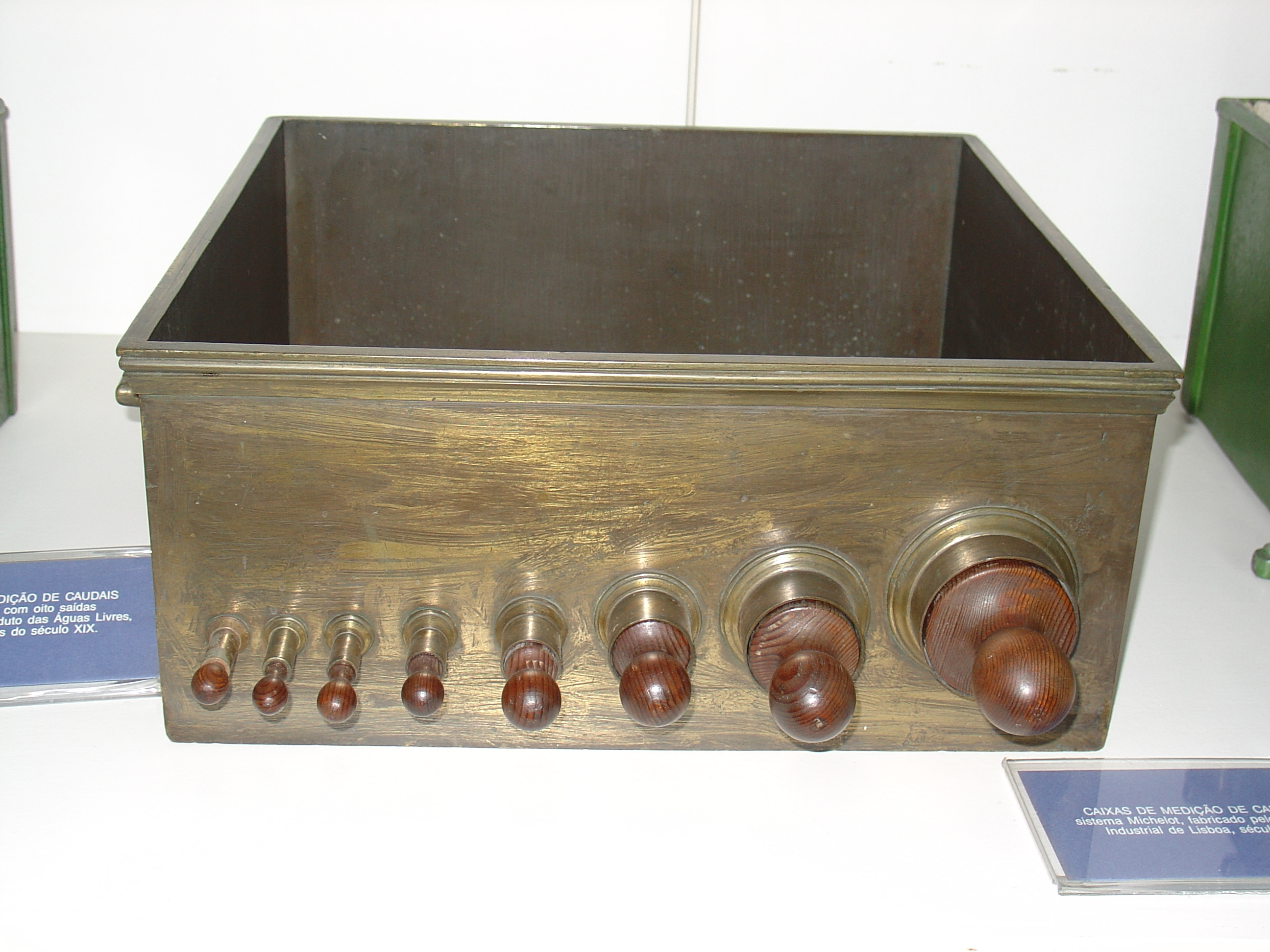 Caisse de mesure système Michelot permettant de mesurer les débits d'eau. XIXe siècle. Museu da agua, Lisbonne (Portugal)